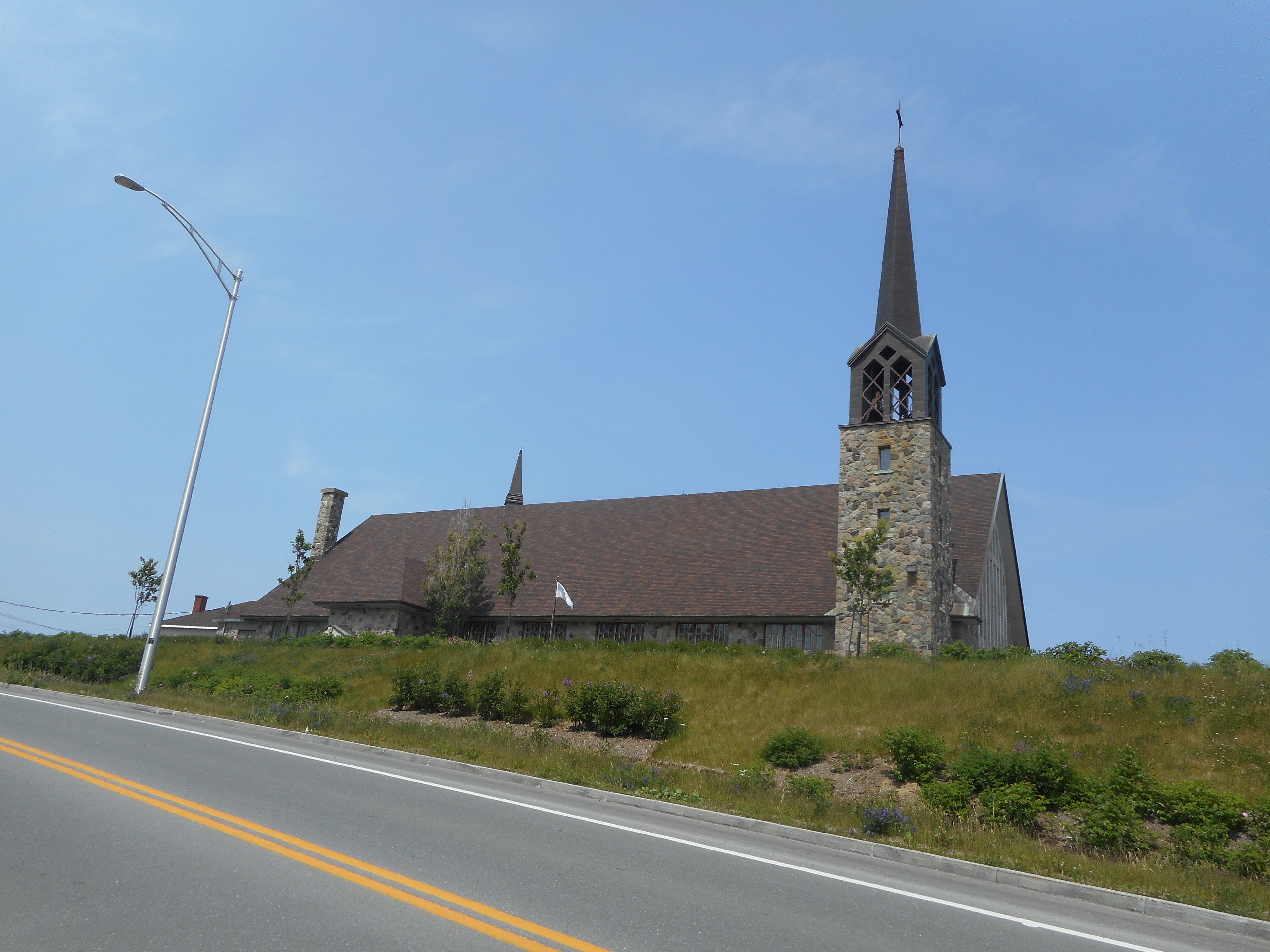 Église de Sainte-Cécile, route 132, Cloridorme, Québec